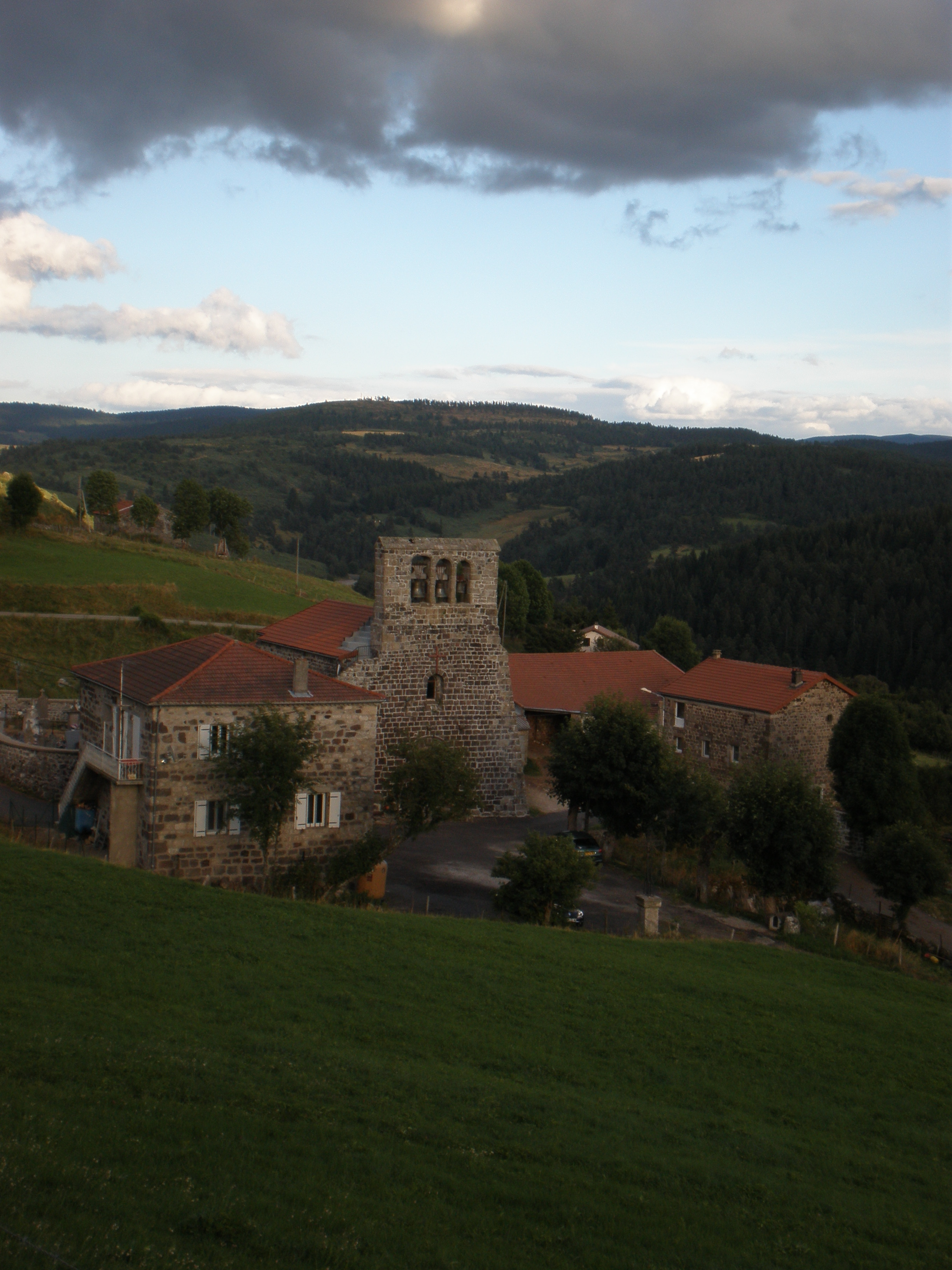 Le village de Lavillatte (Ardèche)